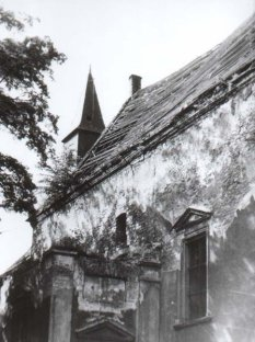 Zdjęcie ruin budynku kościoła przed odbudową. Kościół Zieloświątkowy. Zbór w Świdnicy.